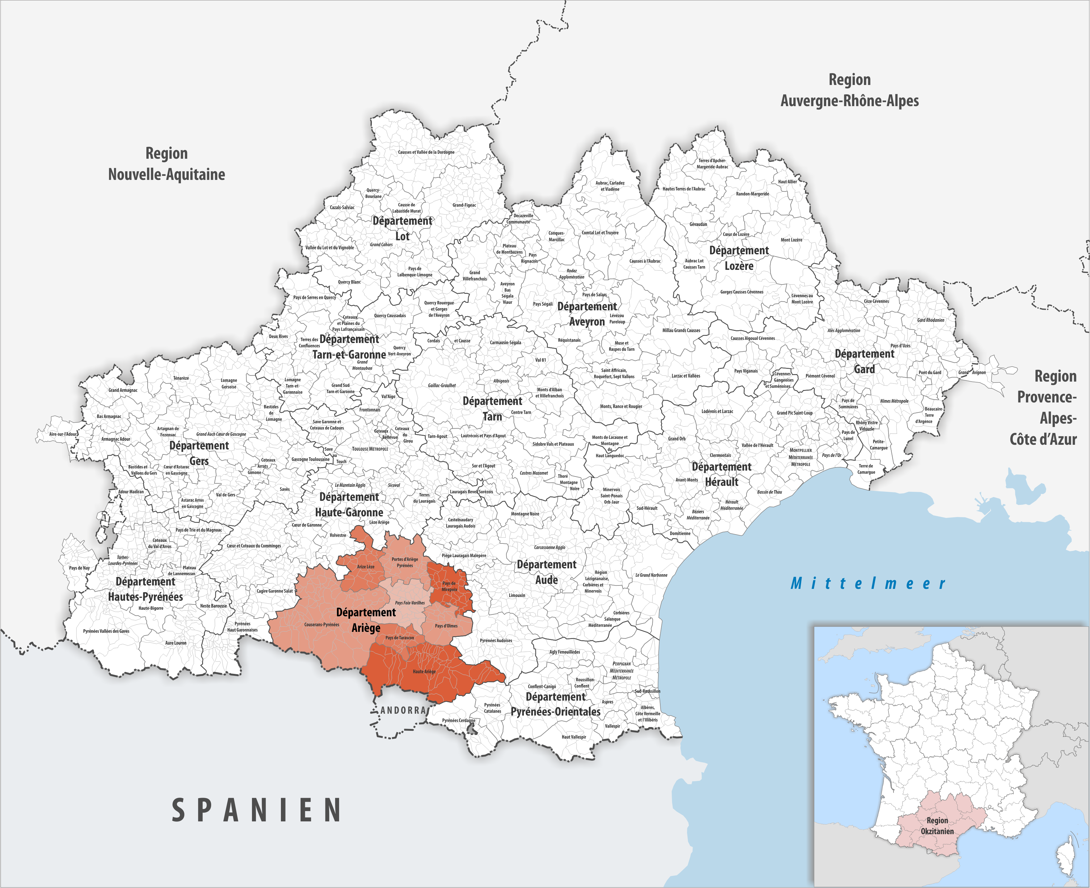 Gemeindeverbände im Département Ariège